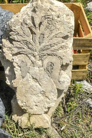 Fouille 2013